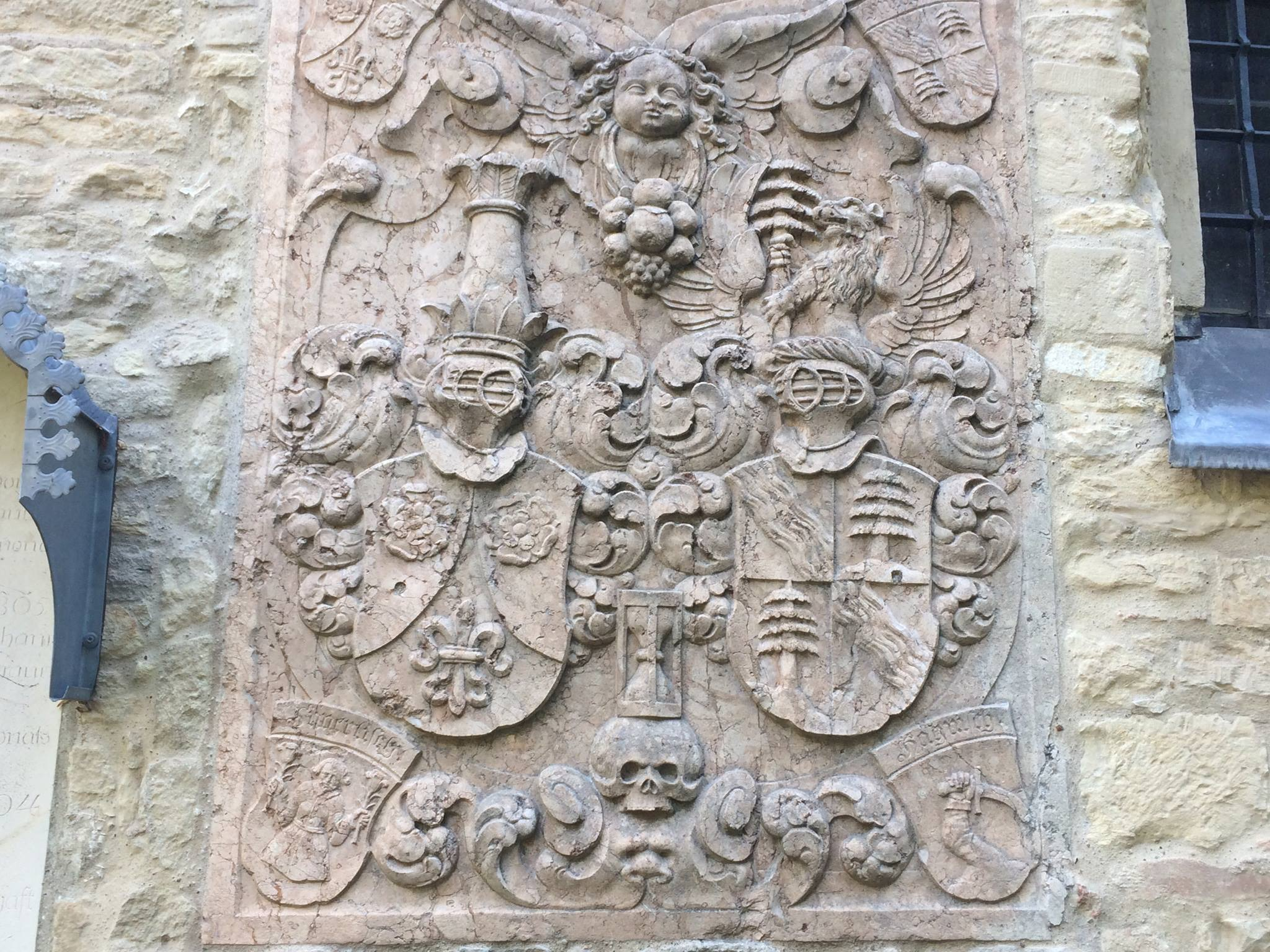 Frühbarocker Epitaph nach 1675, Kirche St. Peter in Straubing.